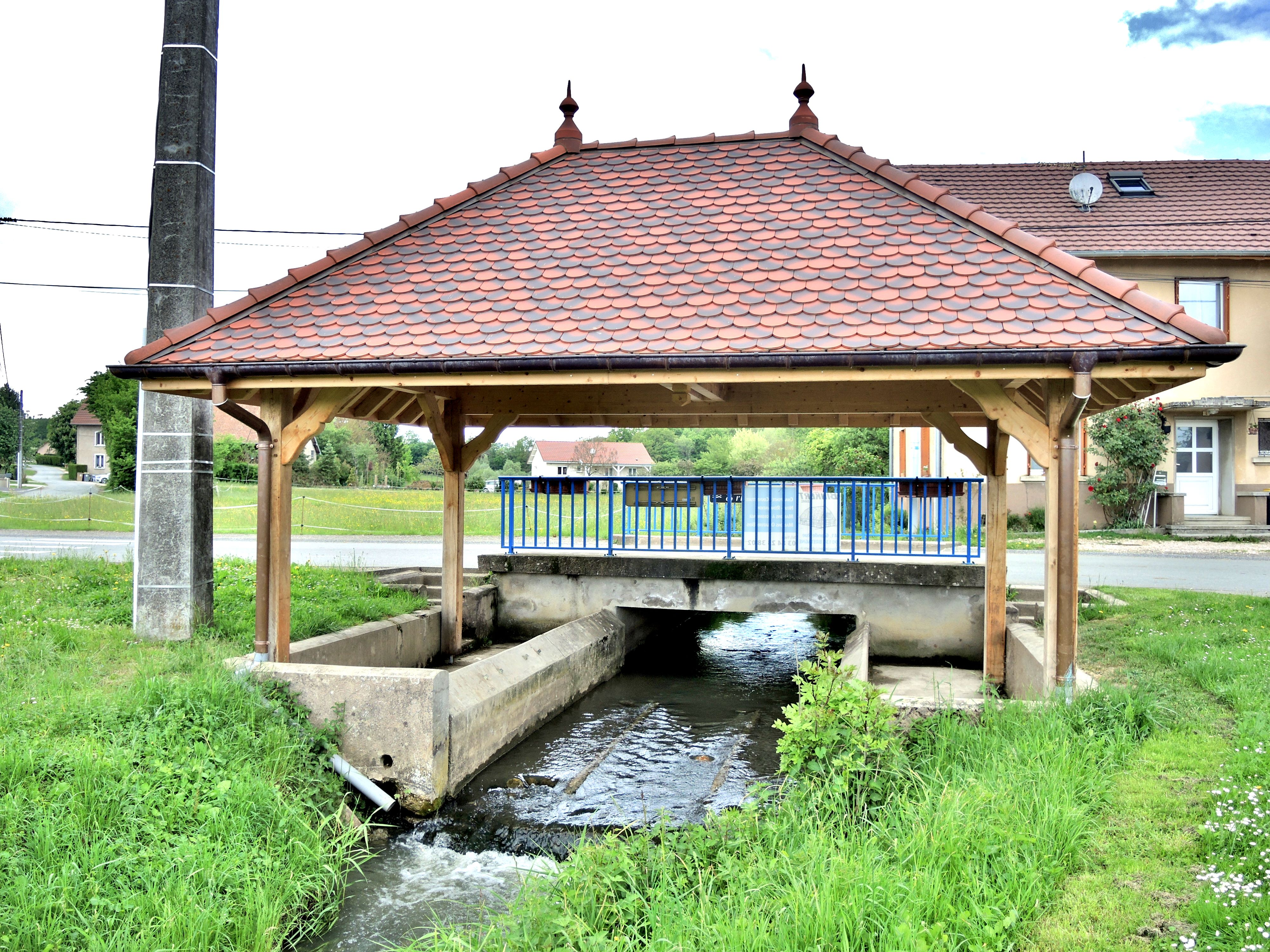 Lavoir couvert sur le ruisseau de l'Etang. Charmois, territoire de Belfort